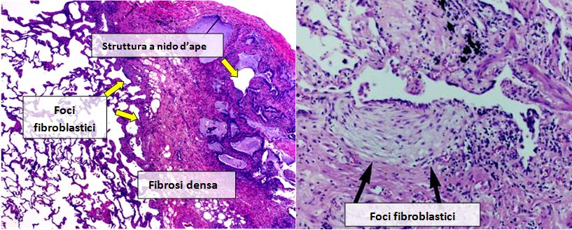 Fotomicrografia dell'aspetto istopatologico della polmonite interstiziale usuale